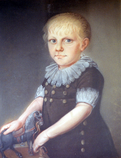 Menno Jans ter Haseborg (1811-1881), later o.a. burgemeester van Hoogezand, vastgelegd als kind door Berend Wierts Kunst